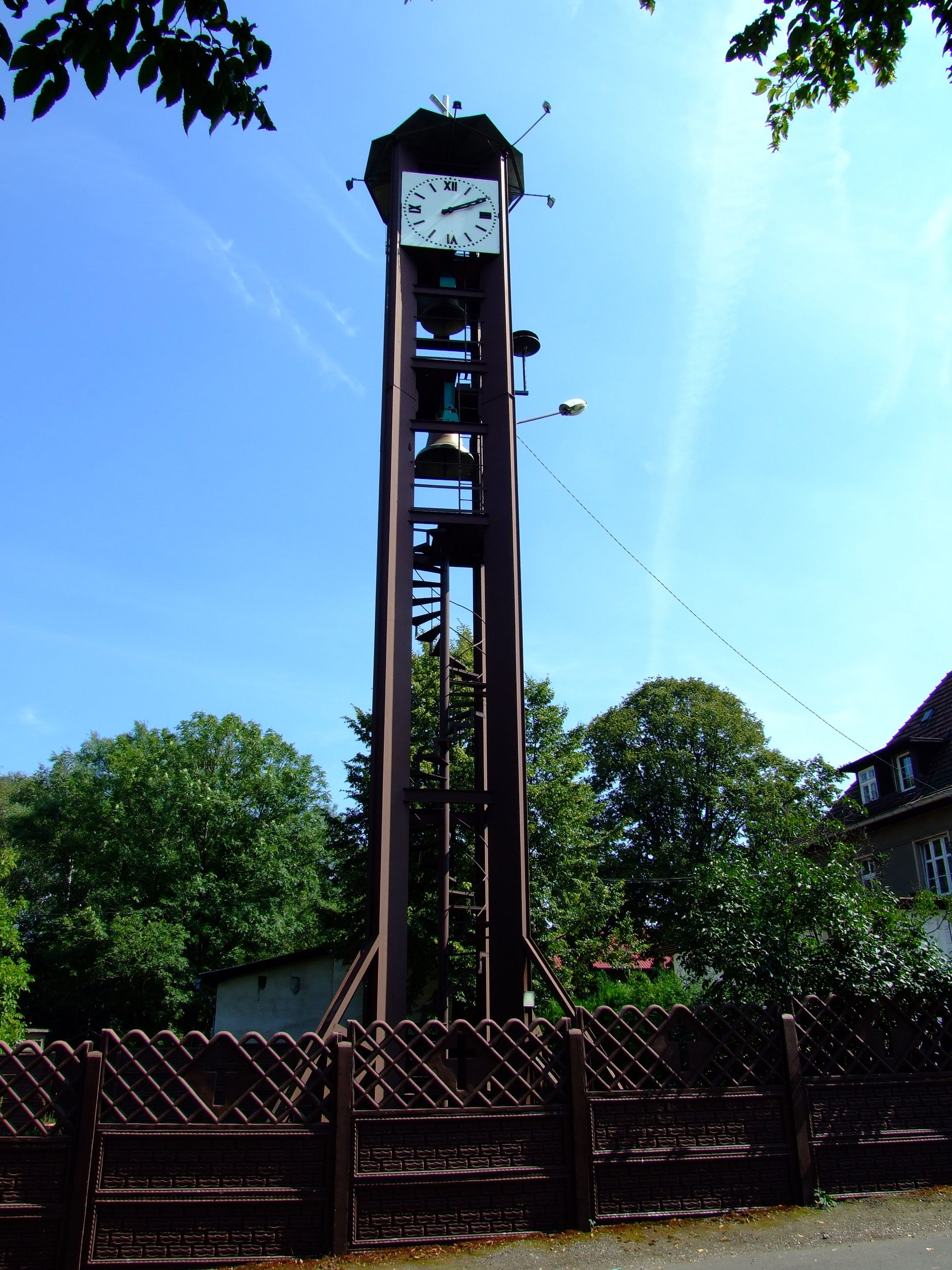 Dzwonnica kaplicy na terenie ojców Kamilianów w Taciszowie